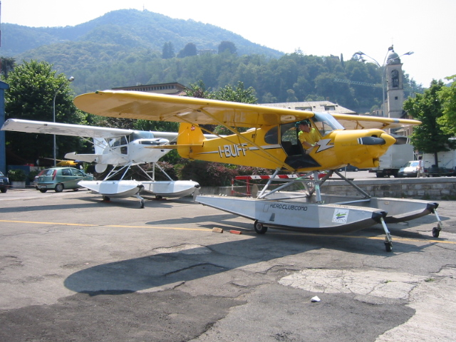 Hydravion Piper PA-18AS-150 Super Cub I-BUFF (cn 18-1809008) Ex. N9616N de l'Aéro-club du Lac de Come en Italie.